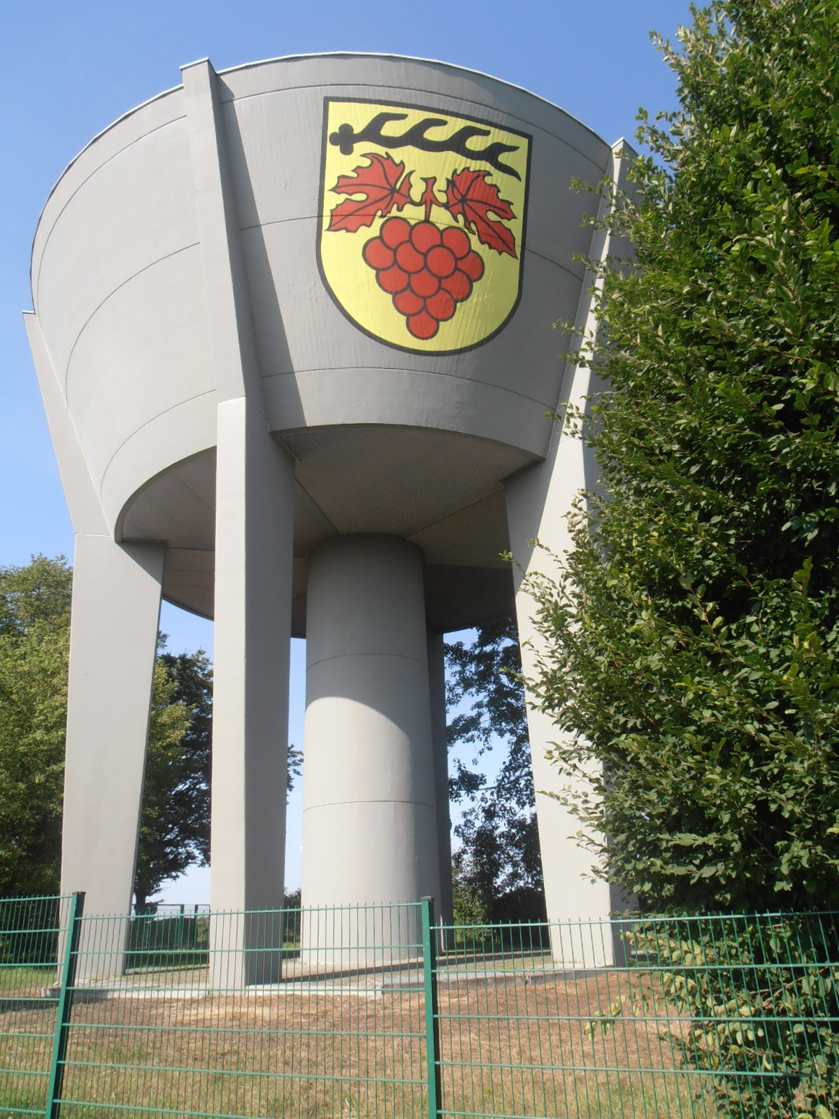 Wasserhochbehälter in Bretzfeld-Scheppach